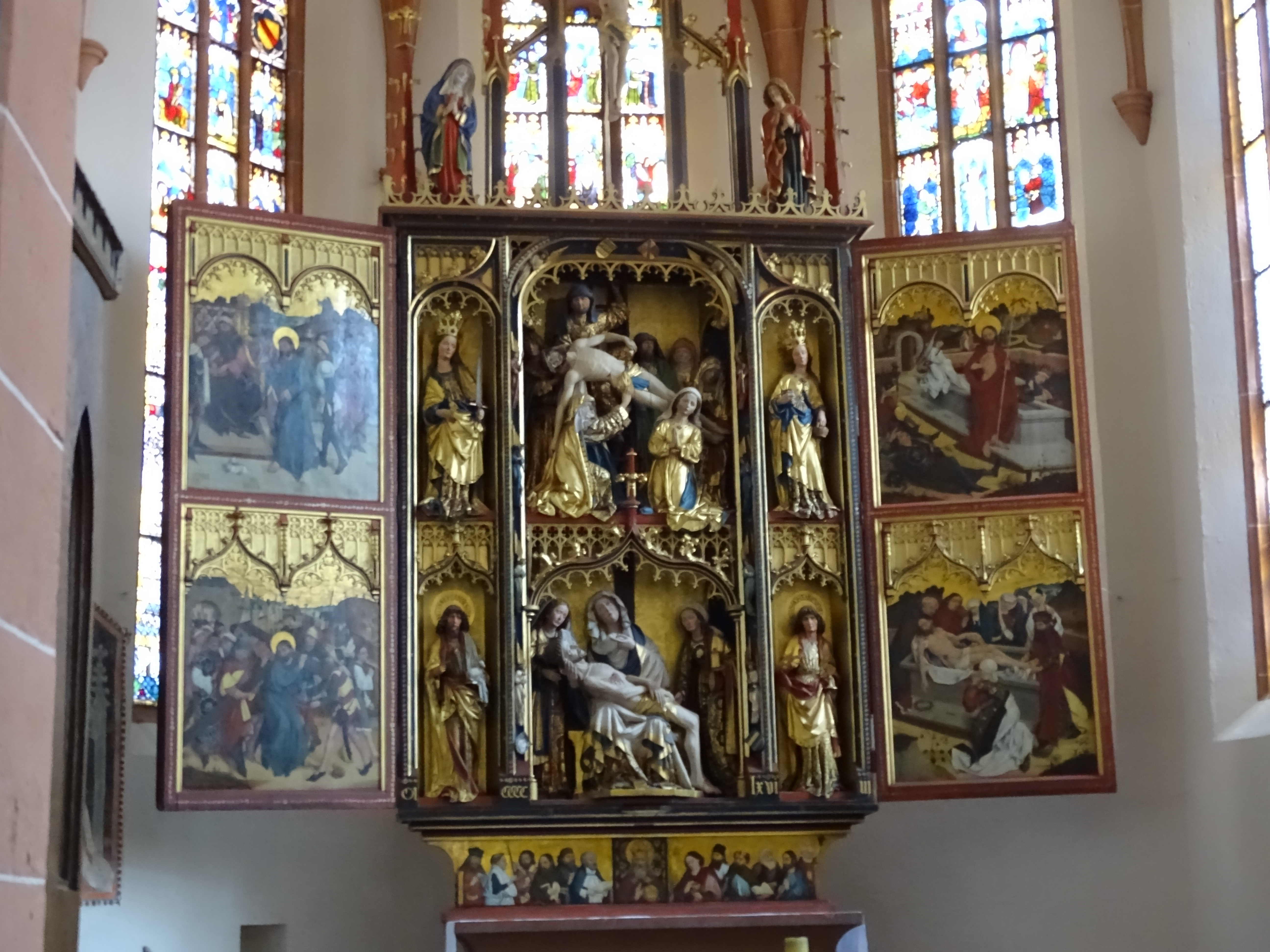 St. Maria Magdalena Kirche Tiefenbronn